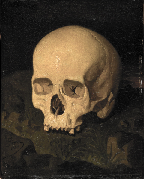 Cráneo humano visto de tres cuartos. Carece de mandíbula. Se apoya en un tapete de color verde. Muestra muchos fallos dentarios. El colorido utilizado es a base de amarillos y tostados. Uso de la parte pictórica para acentuar el relieve.